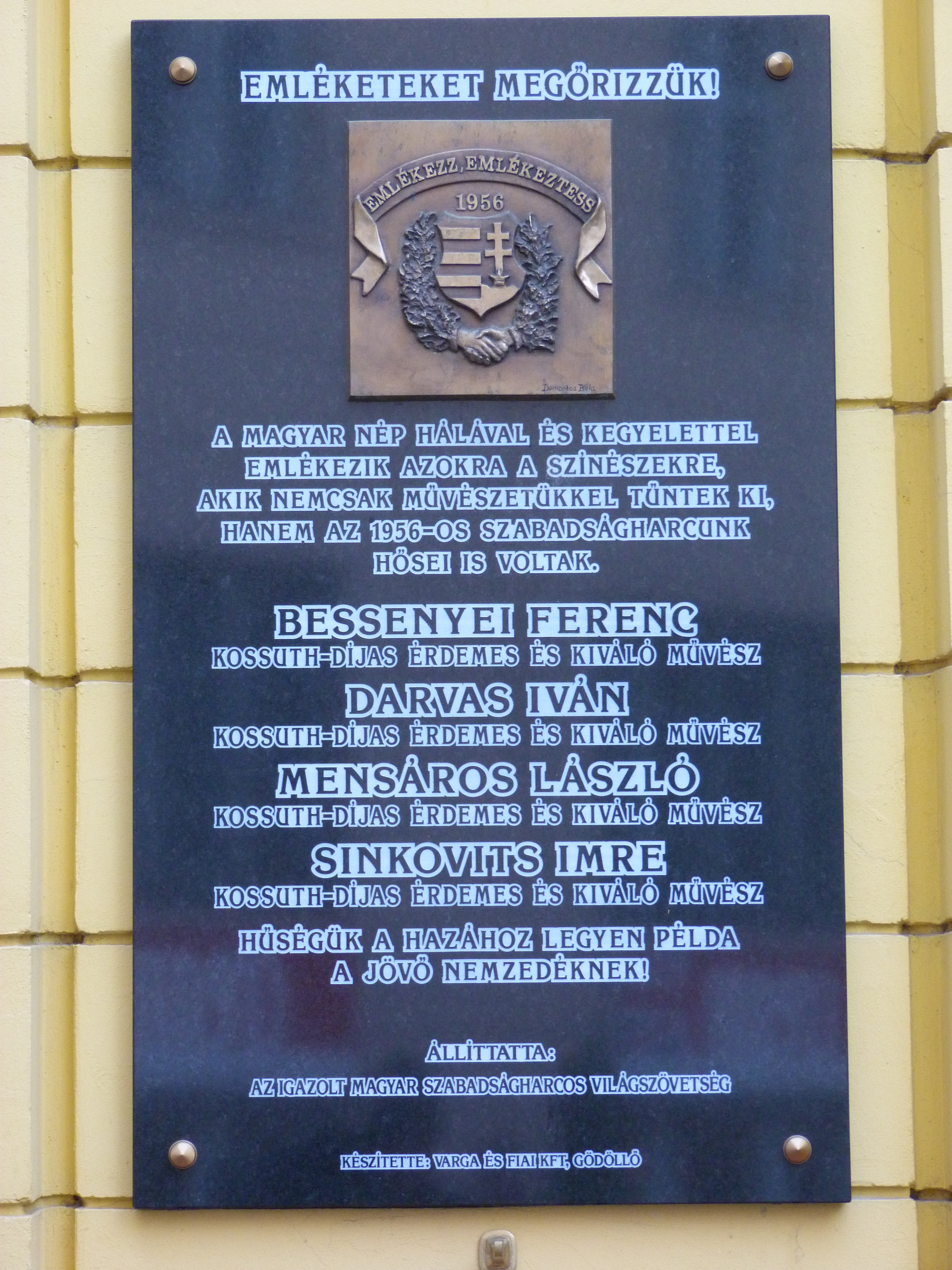 A felvétel 2012. december 5 -én készült Budapesten, a Józsefvárosban. Corvin köz. ©© Published under Creative Commons in the Metapolisz DVD line. All of the photos and vids in the Metapolisz DVD line are under Creative Commons and can be used even for commercial – for profit – purposes. Recommended Citation Derzsi Elekes Andor: Metapolisz DVD line ©© Megjelent Creative Commons alatt a Metapolisz sorozatban. A Metapolisz sorozat valamennyi képe és filmje Creative Commons alatti valamint kereskedelmi - for profit - célra is felhasználható. Ajánlott hivatkozás: Derzsi Elekes Andor: Metapolisz DVD line Másik fénykép ugyanerről az emléktábláról: File:Budapest-corvin-bessenyei.jpg